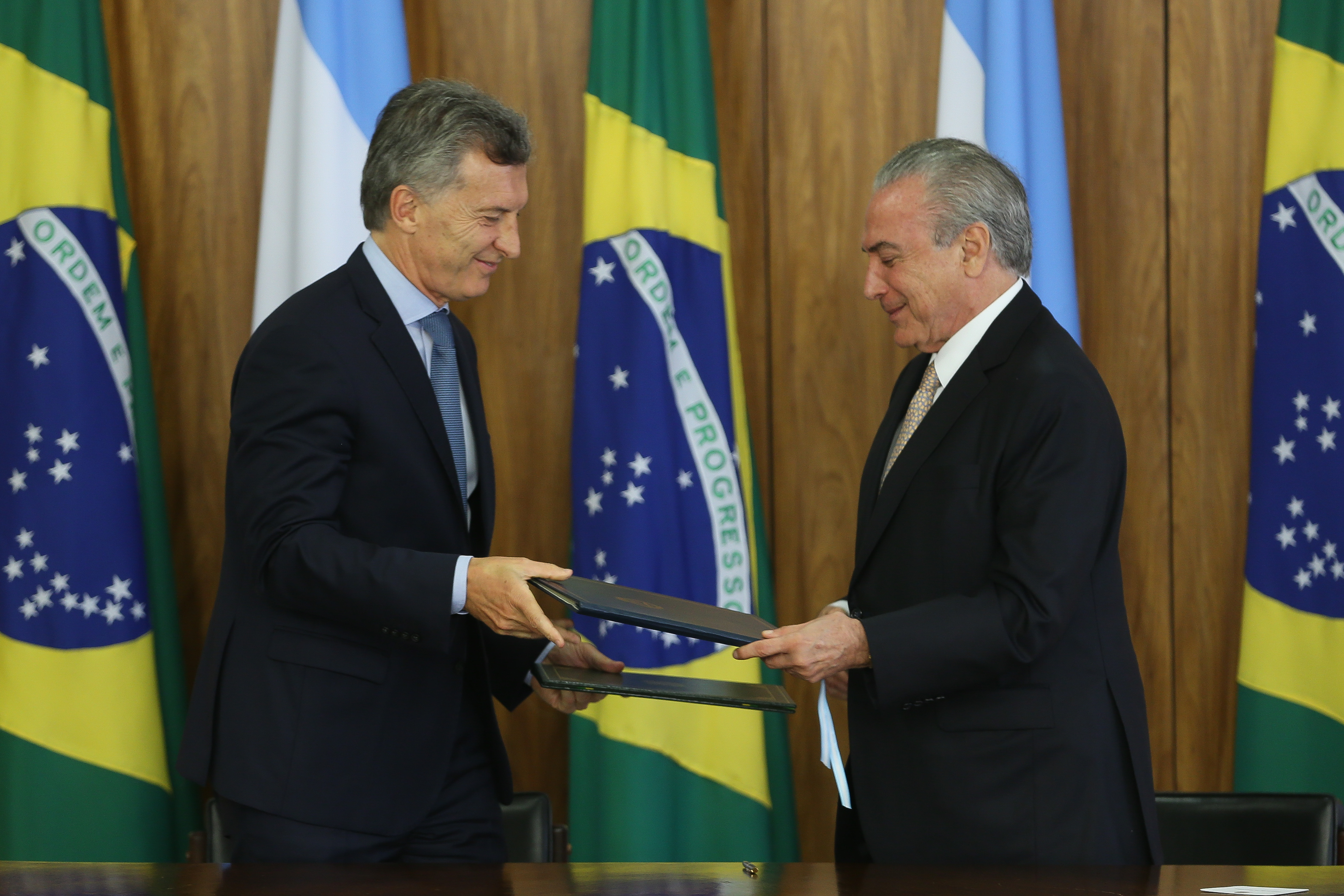 Português do Brasil: Brasília - Presidentes Maurício Macri, da Argentina, e Michel Temer durante cerimônia de assinatura de Atos, no Palácio do Planalto (Antonio Cruz/ Agência Brasil)